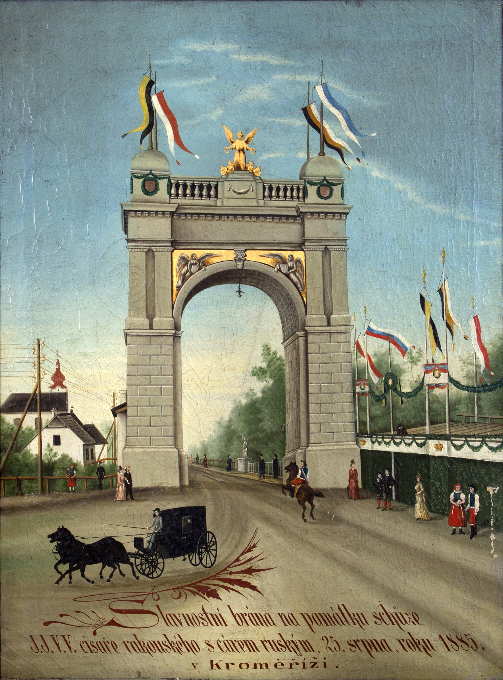 Obraz slavnostní brány k příjezdu císařů v roce 1885 na setkání do Kroměříže od Antonína Tomáše Becka (1835-1908) uložený v Muzeu Kroměřížska; slavobrána k uvítání císařů.